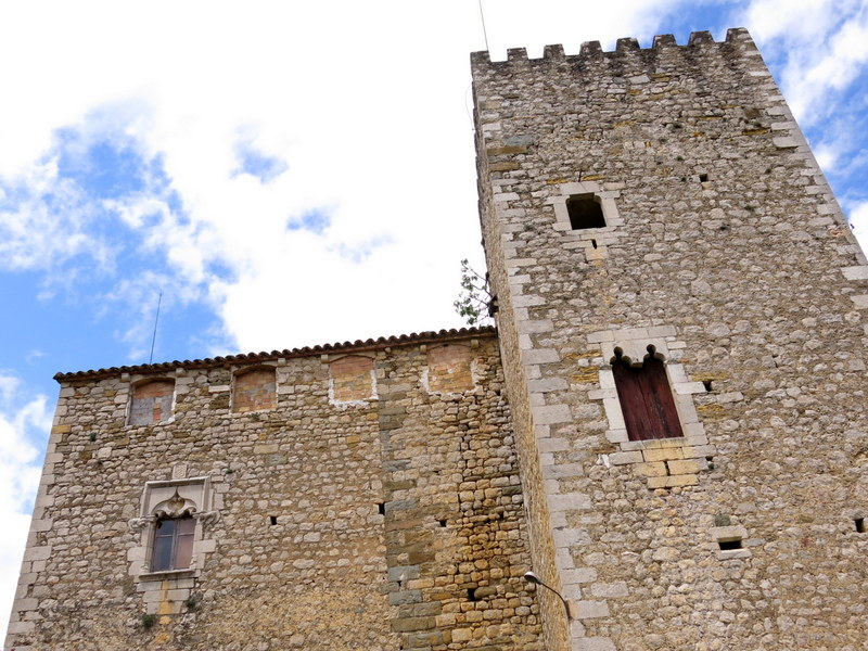 Castell de Beuda a la Garrotxa - Catalunya